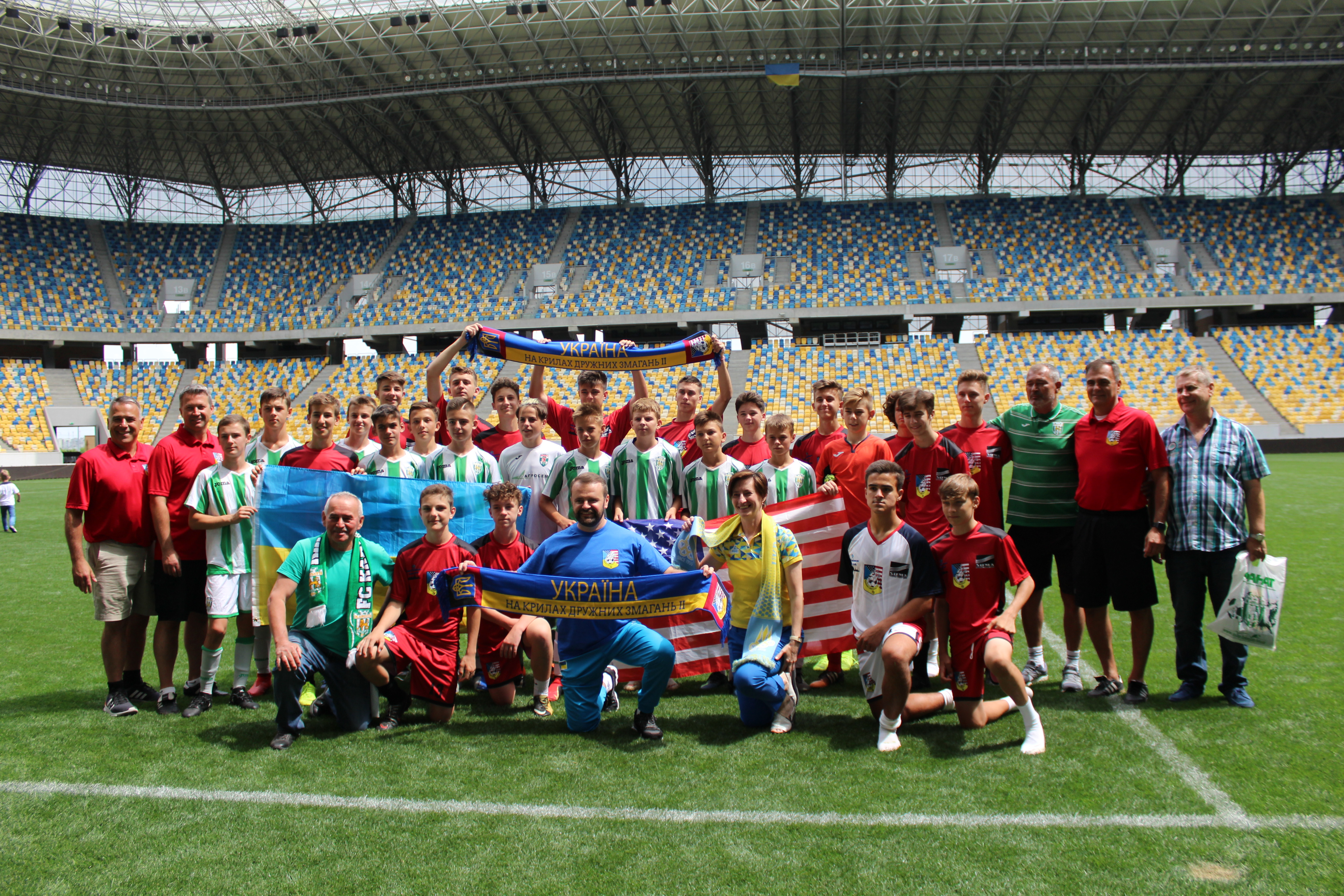 матч з українською діаспорою на Арені Львів 20 липня 2019